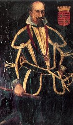 Retrato de Vasco de Mascarenhas (c.1605 - 1678), 1.º Conde de Óbidos.